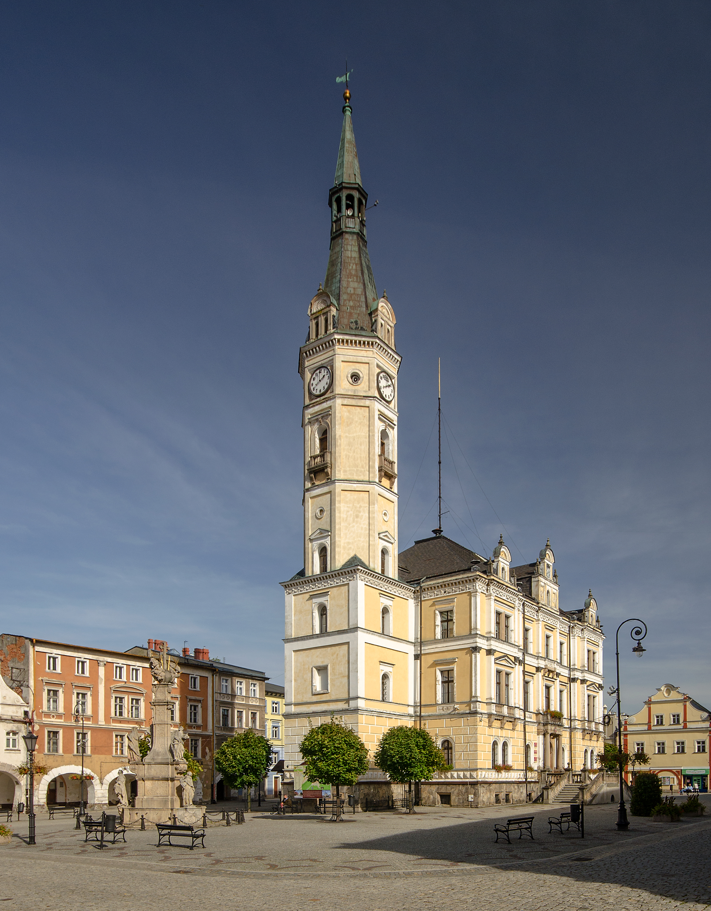 Lądek-Zdrój, ratusz, 1537, 1739, 1872